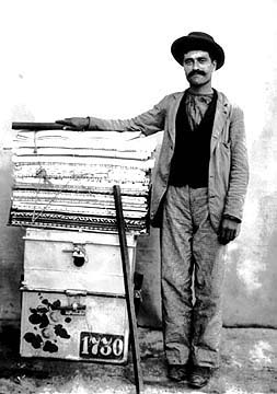 Vendedor de tecidos no Rio de Janeiro